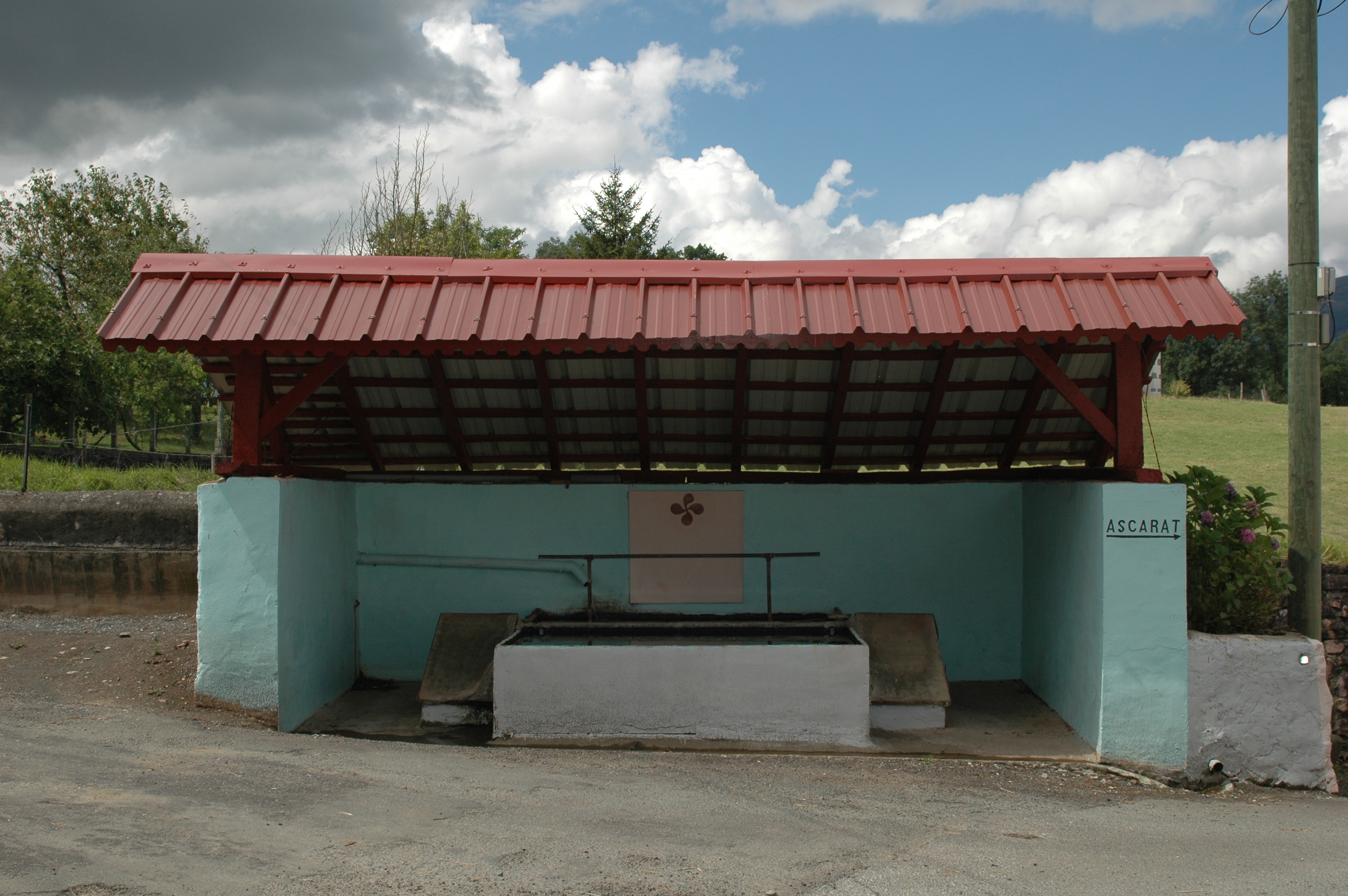 Lasse, le lavoir